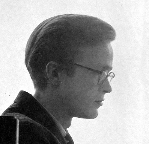 Gösta Oswald